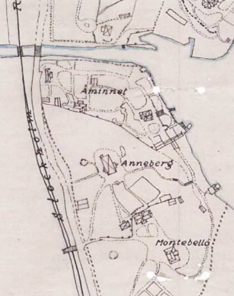 Handmålad karta från tidigt 1900tal.